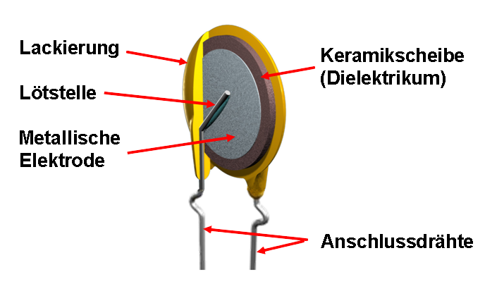 Keramik-Scheibenkondensator